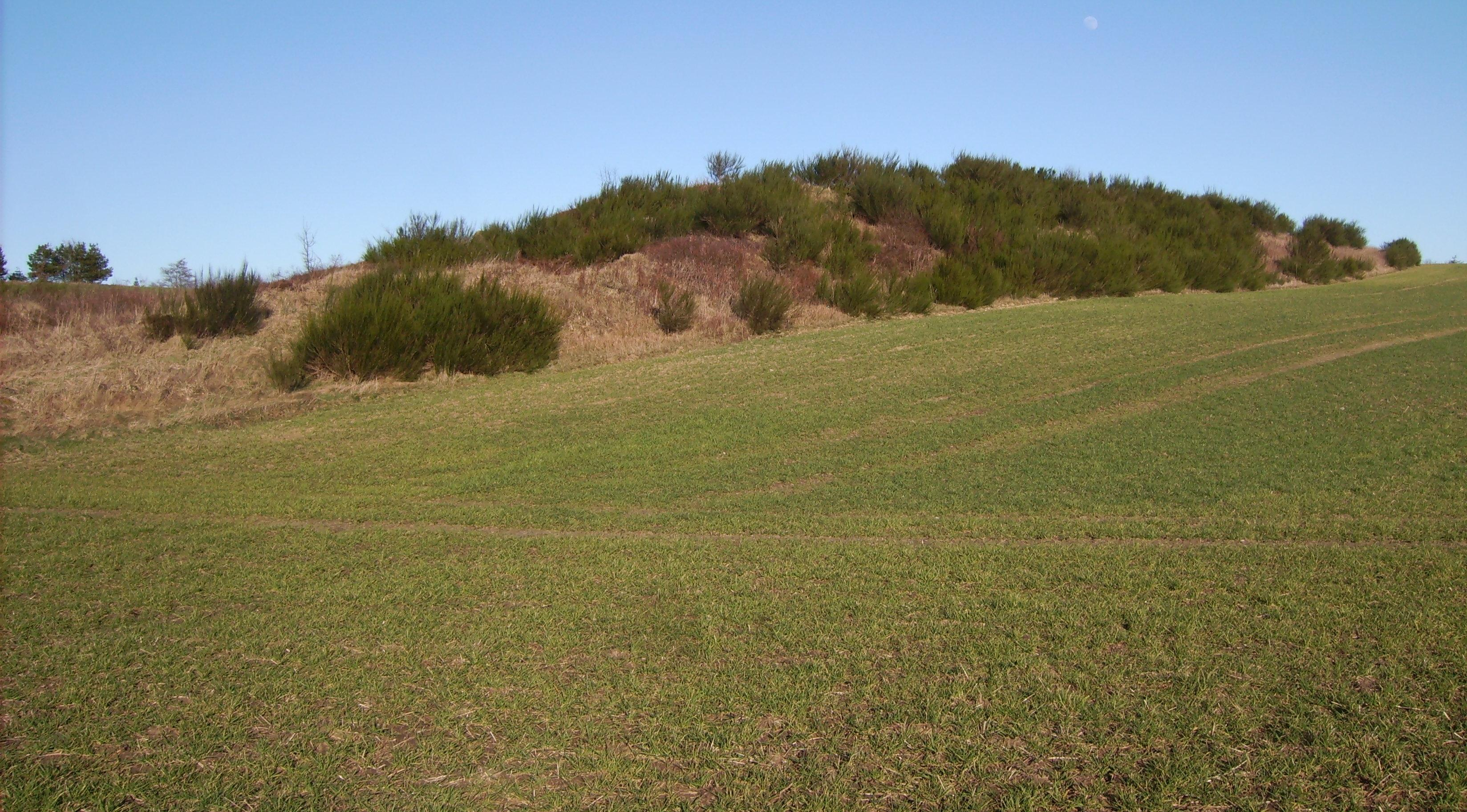 A dolmen (Stenstuen ved Gærum) 68 x 17 x 3 meter, with a burial chamber, has the number SB 102, in the parish Gærum in Frederikshavn municipality, Denmark. SB 102 (Stednavne: Vester Annexpræstegaard), Gærum sogn, Frederikshavn Kommune. Anlæg SB 102 (Stenstuen ved Gærum), langdysse med et kammer, omgivet af 57 store randsten. Længde 68 m, bredde 17 m & højde 3 m. Source: SB 102